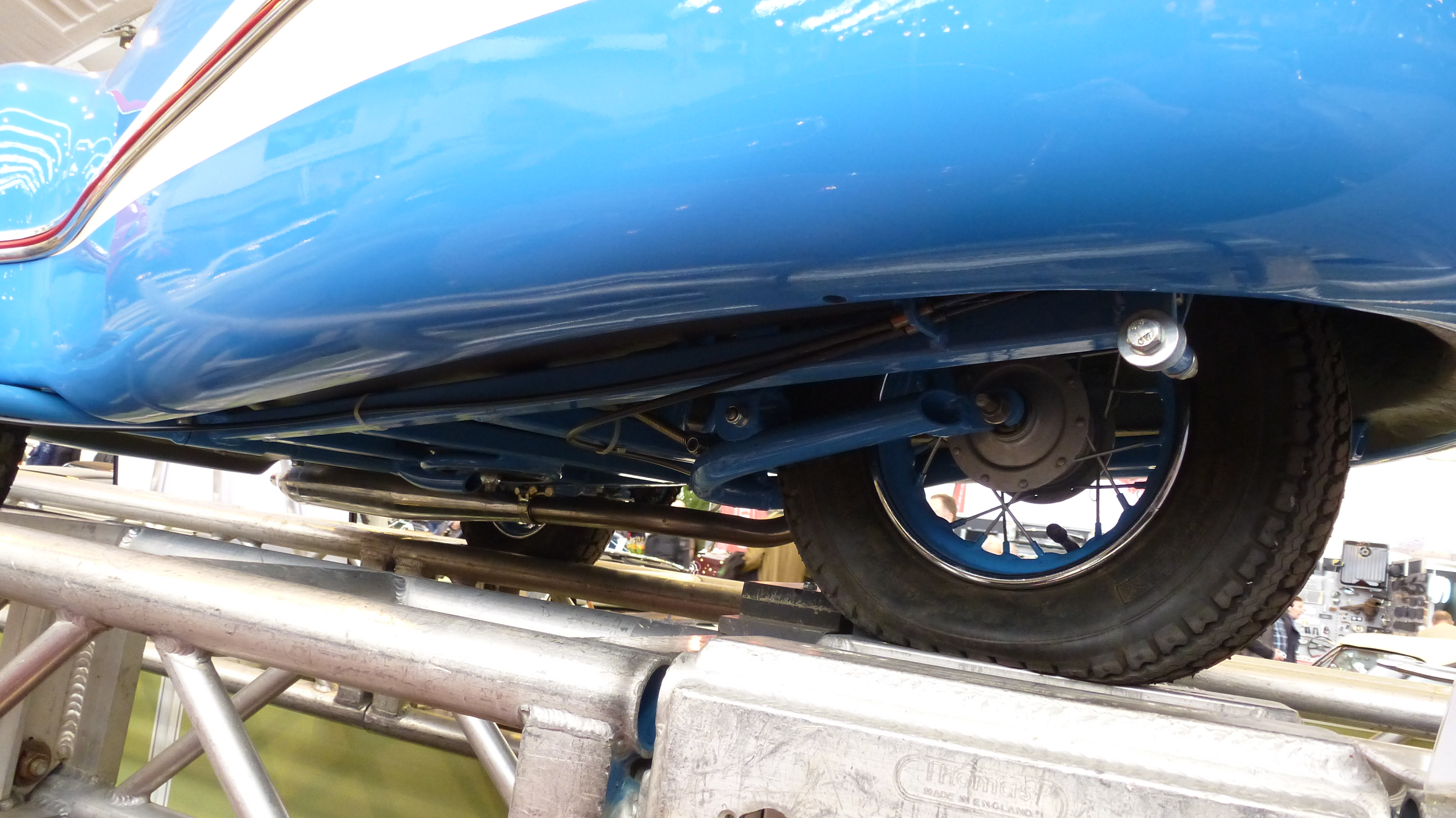 Mopetta GmbH Mopetta Nachbau von Andy Carter